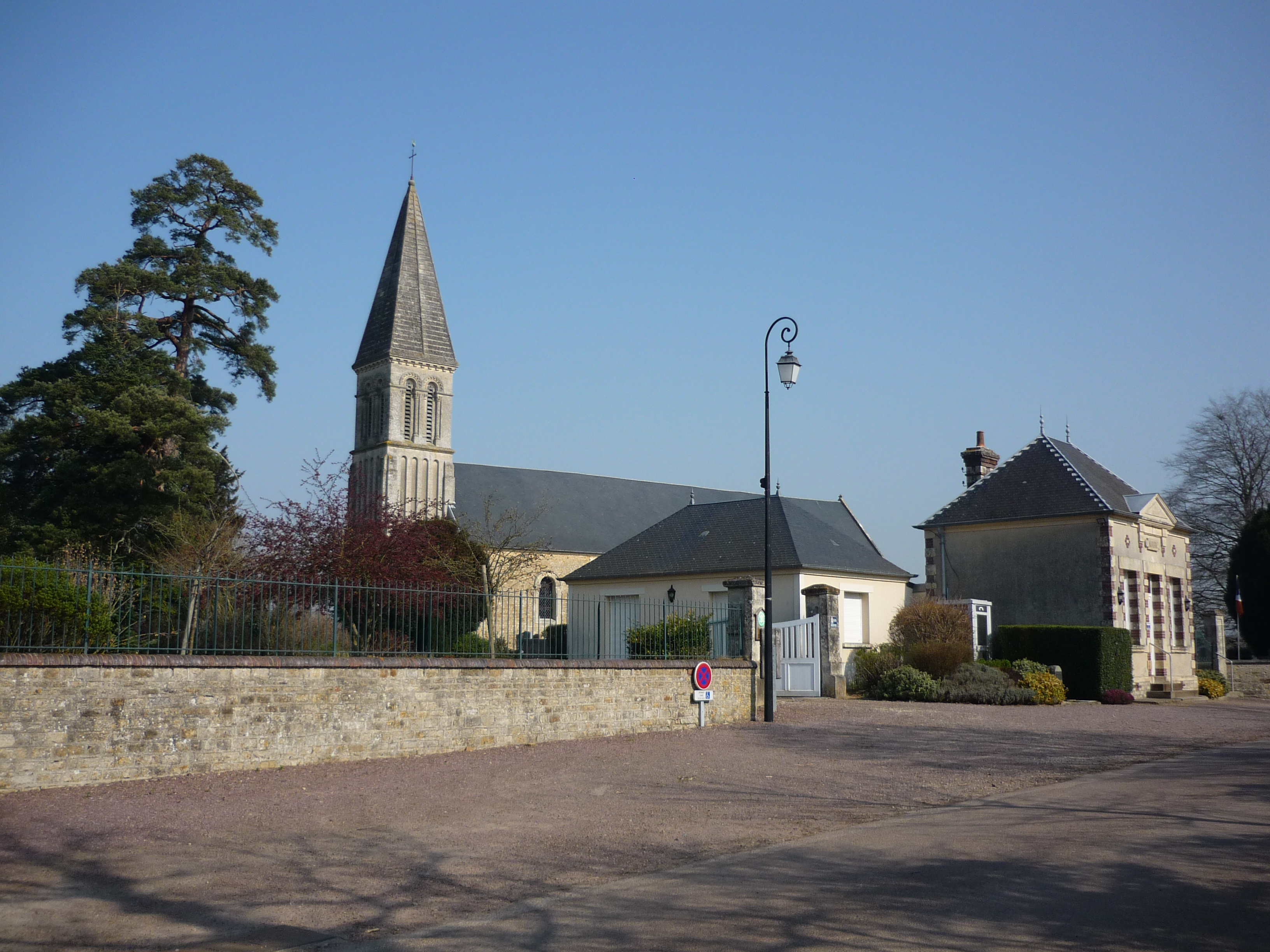 Mairie et église de Saint-Vaast-sur-Seulles (Calvados)